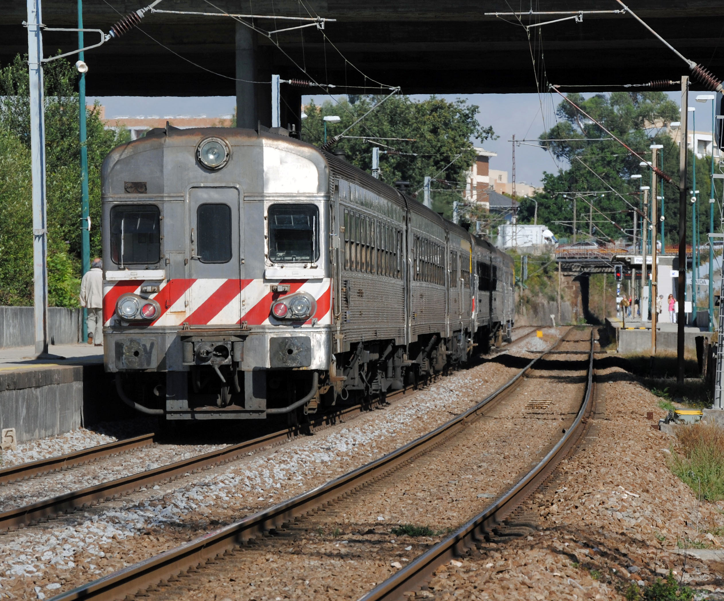 Dupla de UTD's em Águas Santas